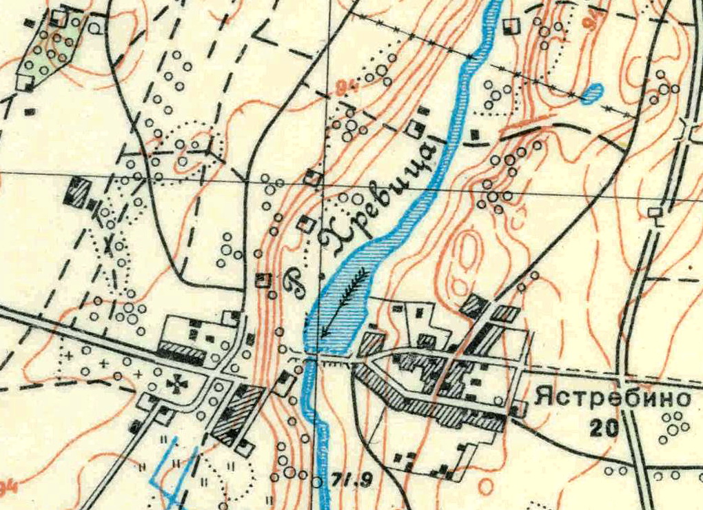 Топографическая карта Ленинградской области, квадрат О-35-22-Г-г (Торма), деревня Ястребино.